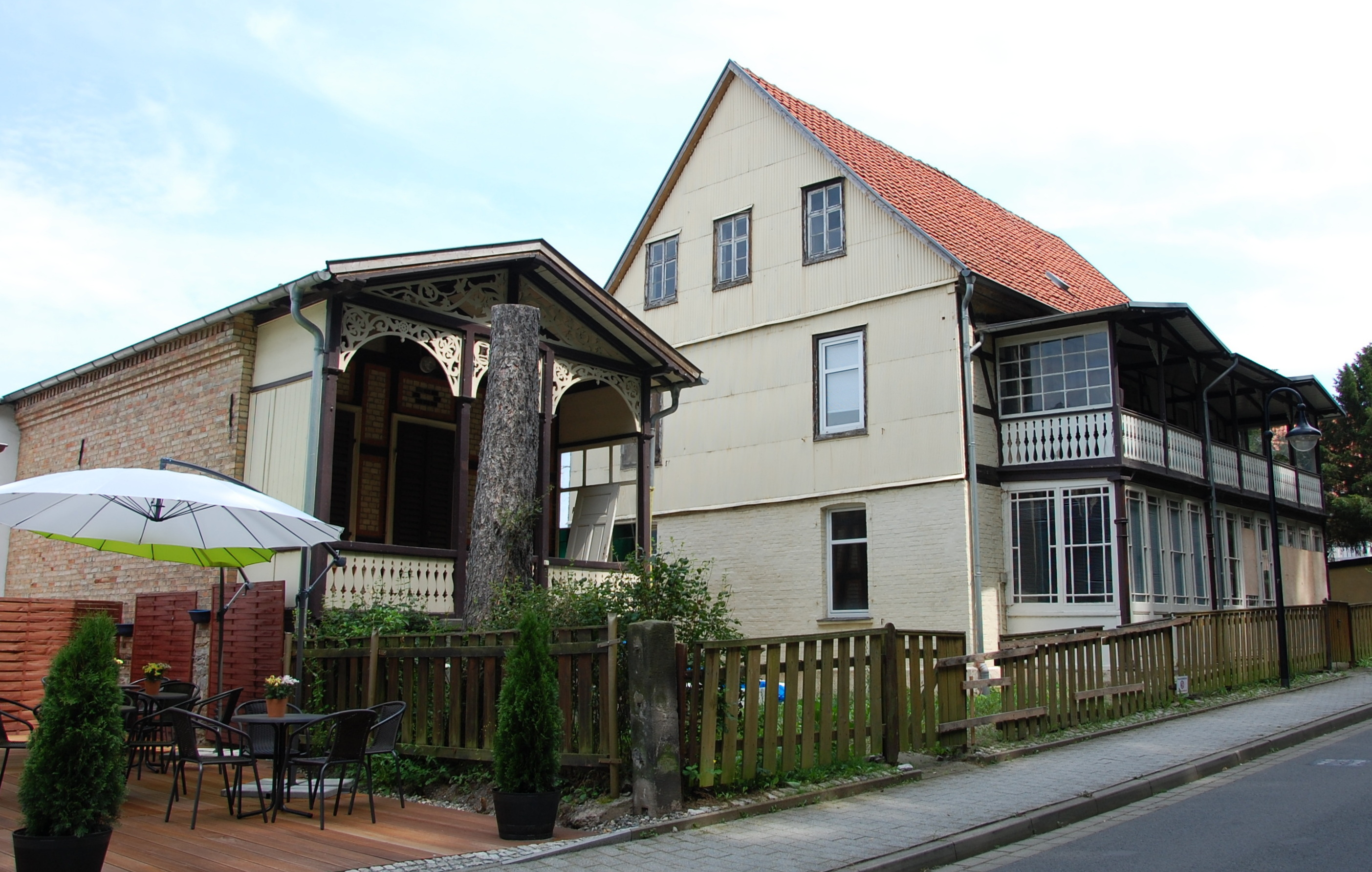 Häuser Schwedderbergstraße 25, 27 in Bad Suderode